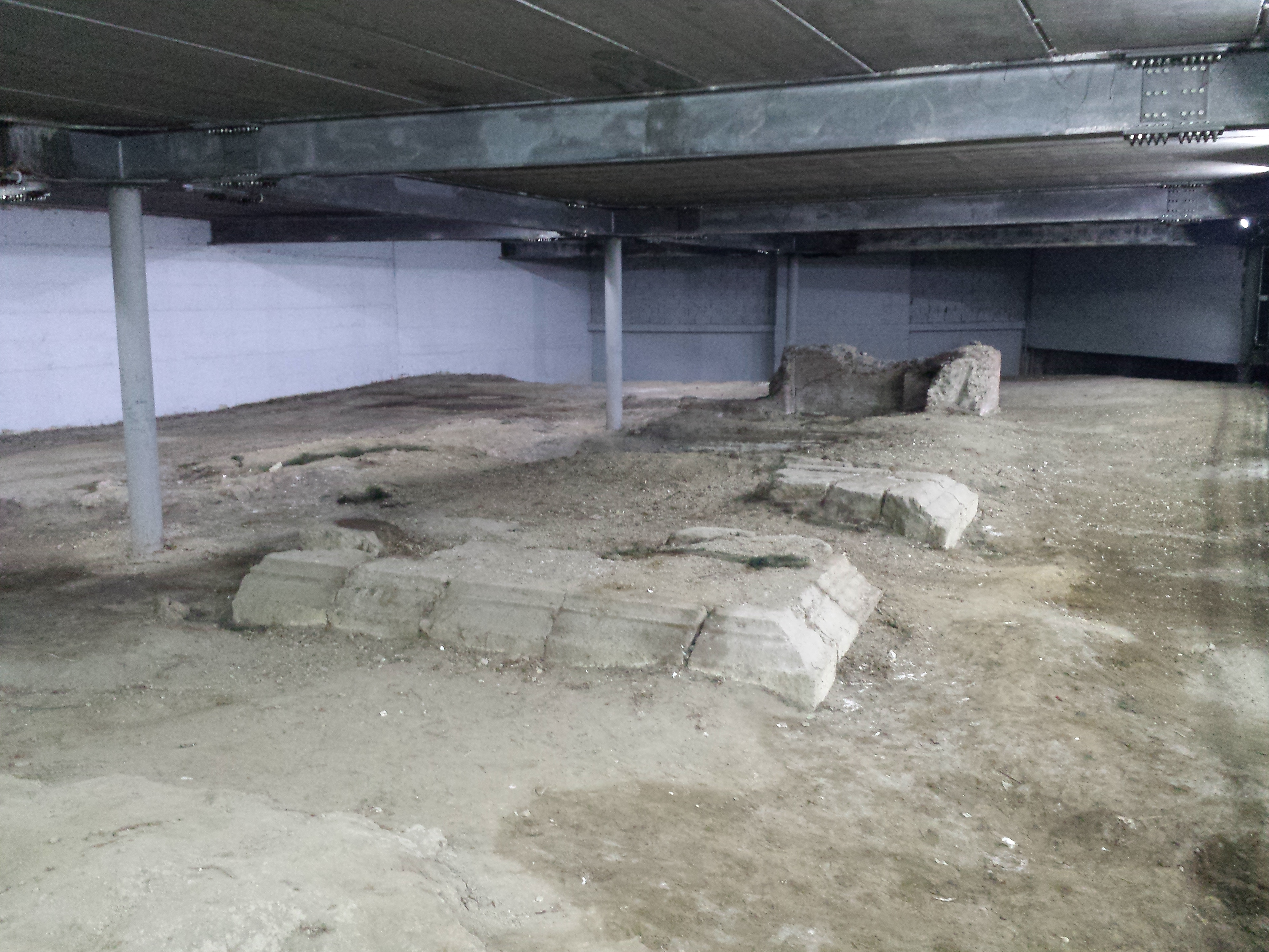 Monumenti funerari di piazza del Corso, Nocera Inferiore